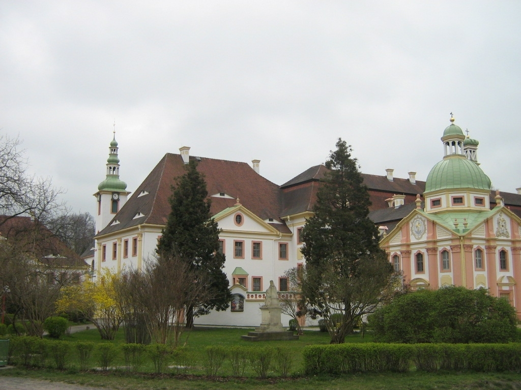 Das Kloster St. Marienthal in der Oberlausitz, Sachsen.